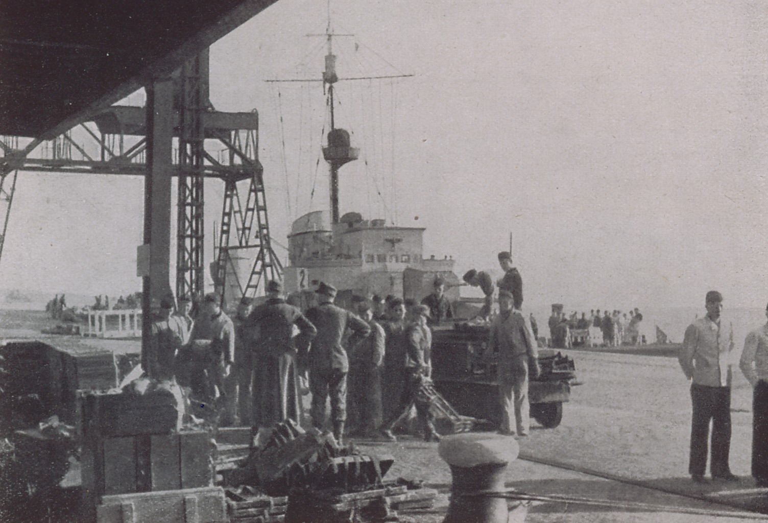 Zerstörer an der Columbuskaje in Bremerhaven vor dem Auslaufen zum Unternehmen Weserübung. Auf der Pier Gepäck der eingeschifften Gebirgsjäger.